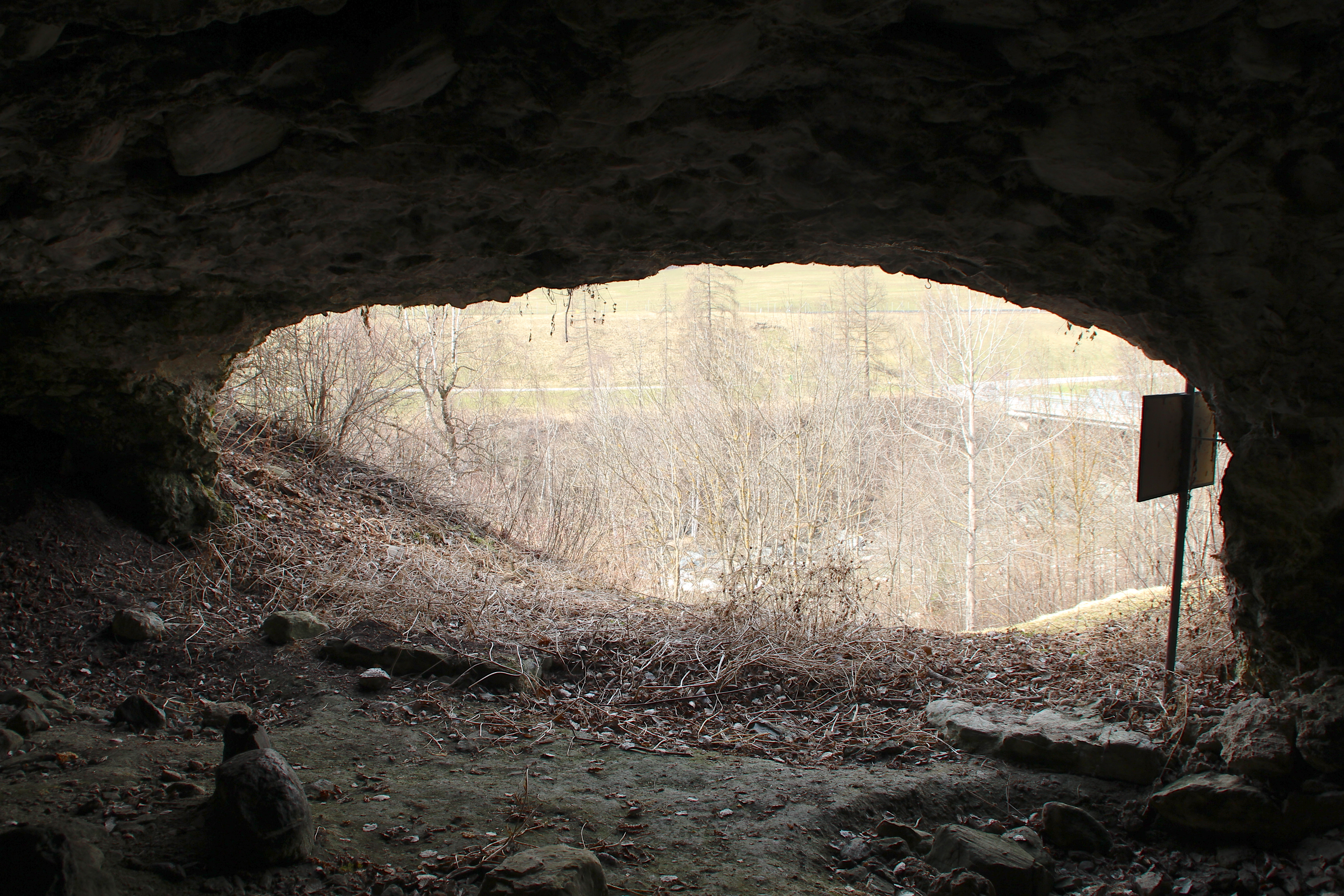 Kulthöhle Zillis